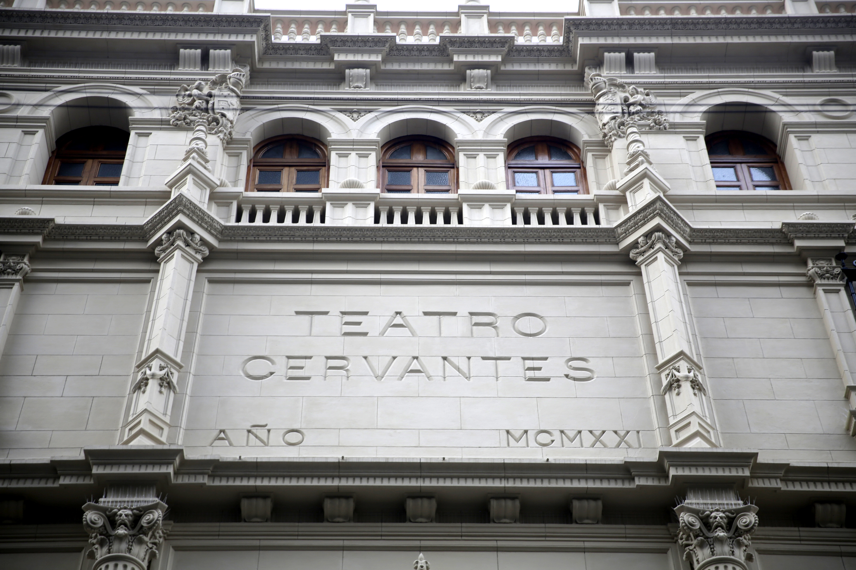 Buenos Aires, 24 de julio de 2018.- Imágenes de las obras en la fachada del Teatro Nacional Cervantes. Fotos: Kaloian / Secretaría de Cultura de la Nación.